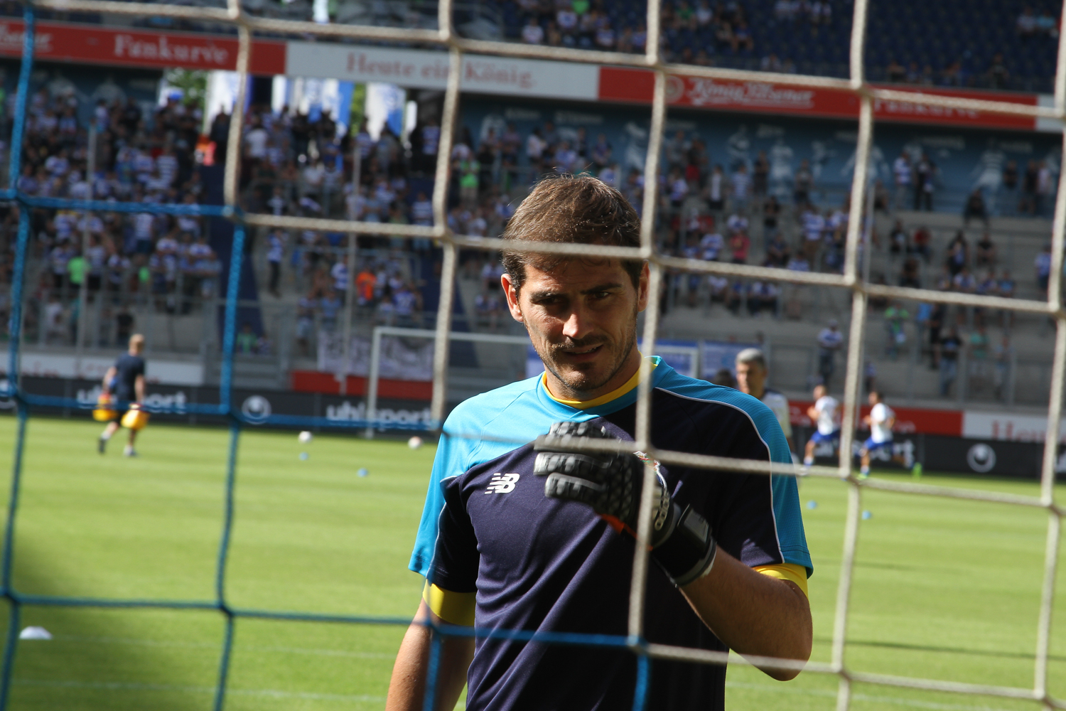 Iker Casillas